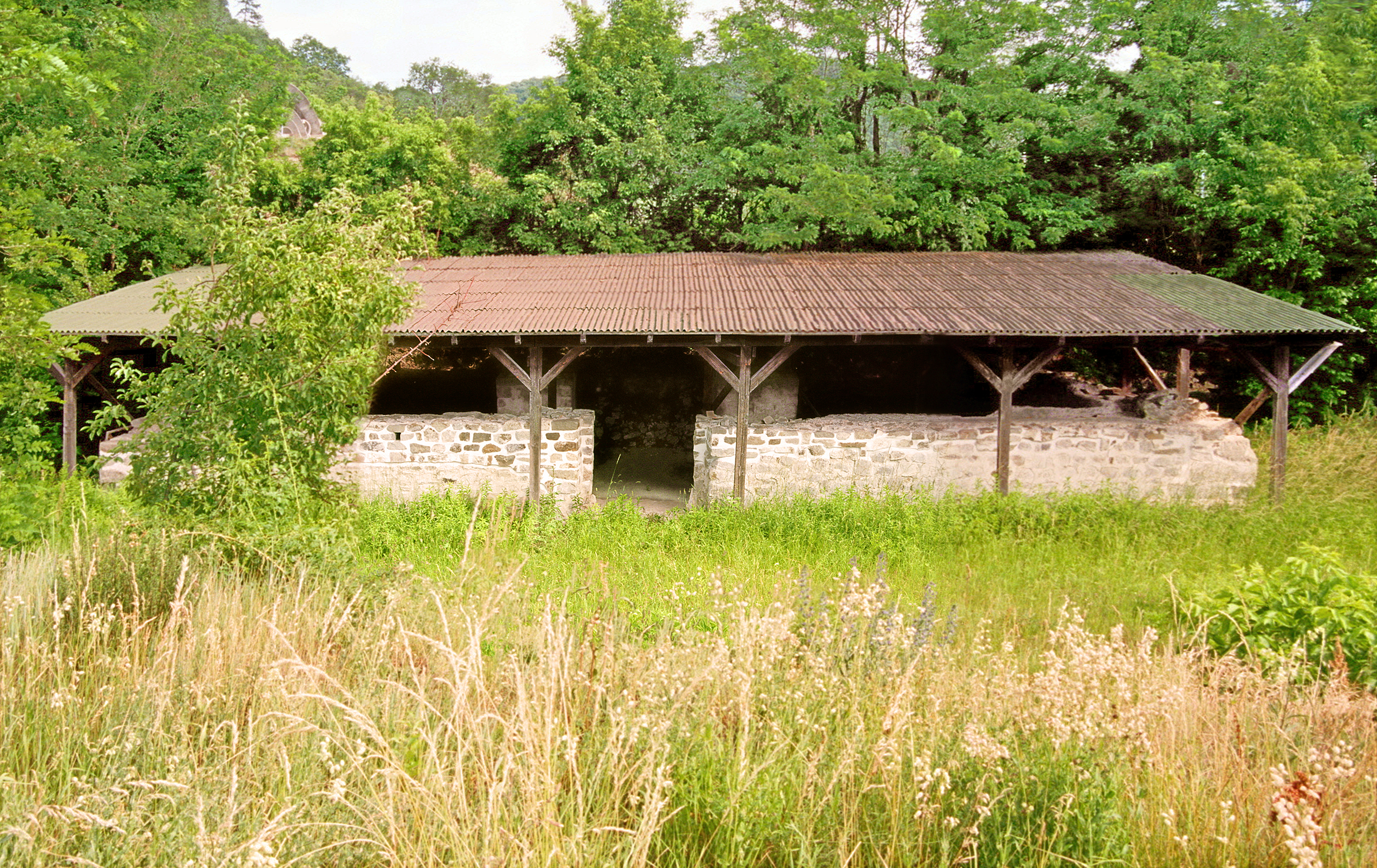 Visegrád–Lepence – Burgus Solva 35: Blick von Nordwesten